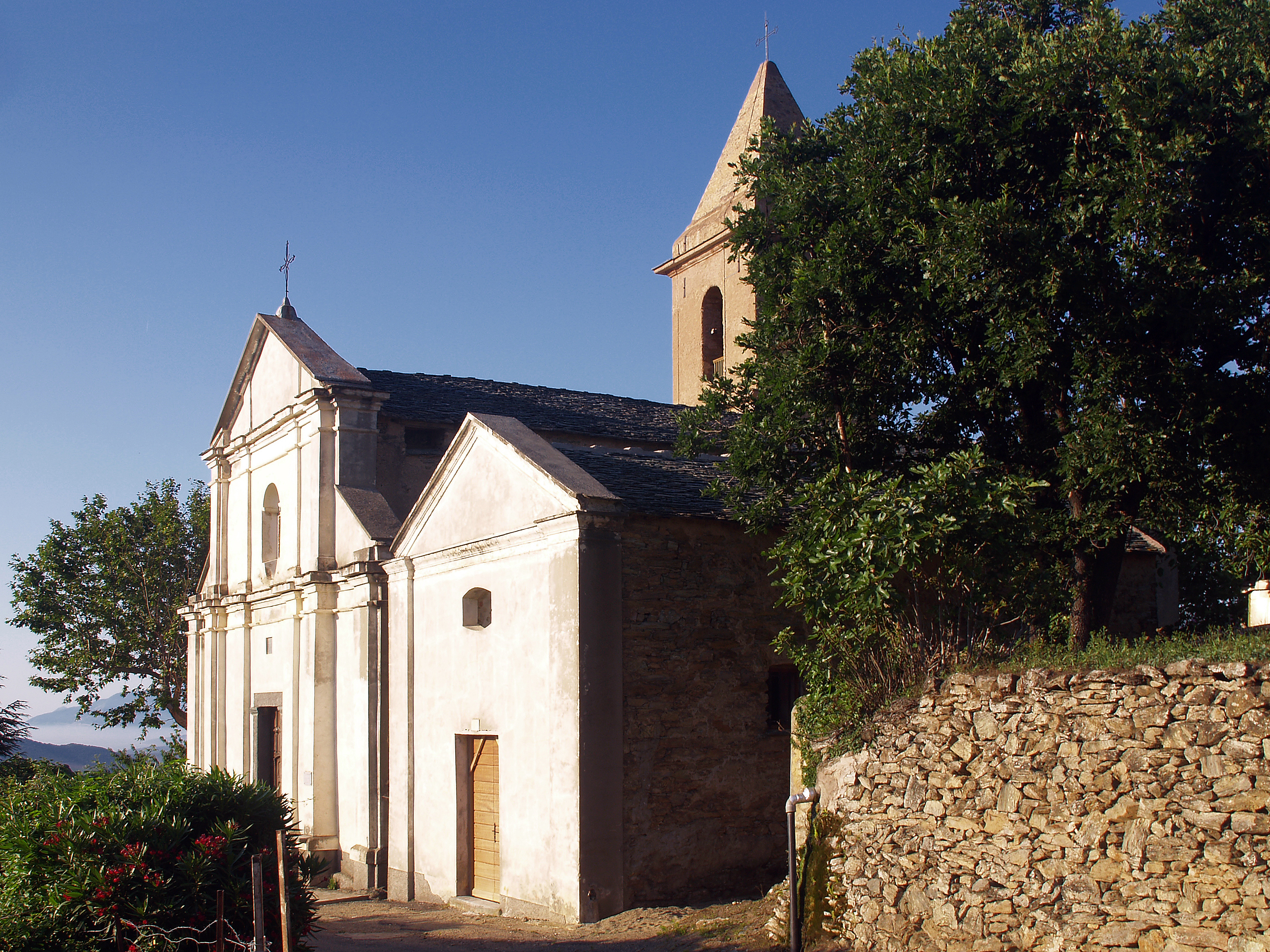 Rapale (Corse) - Eglise paroissiale Santa-Maria-Assunta